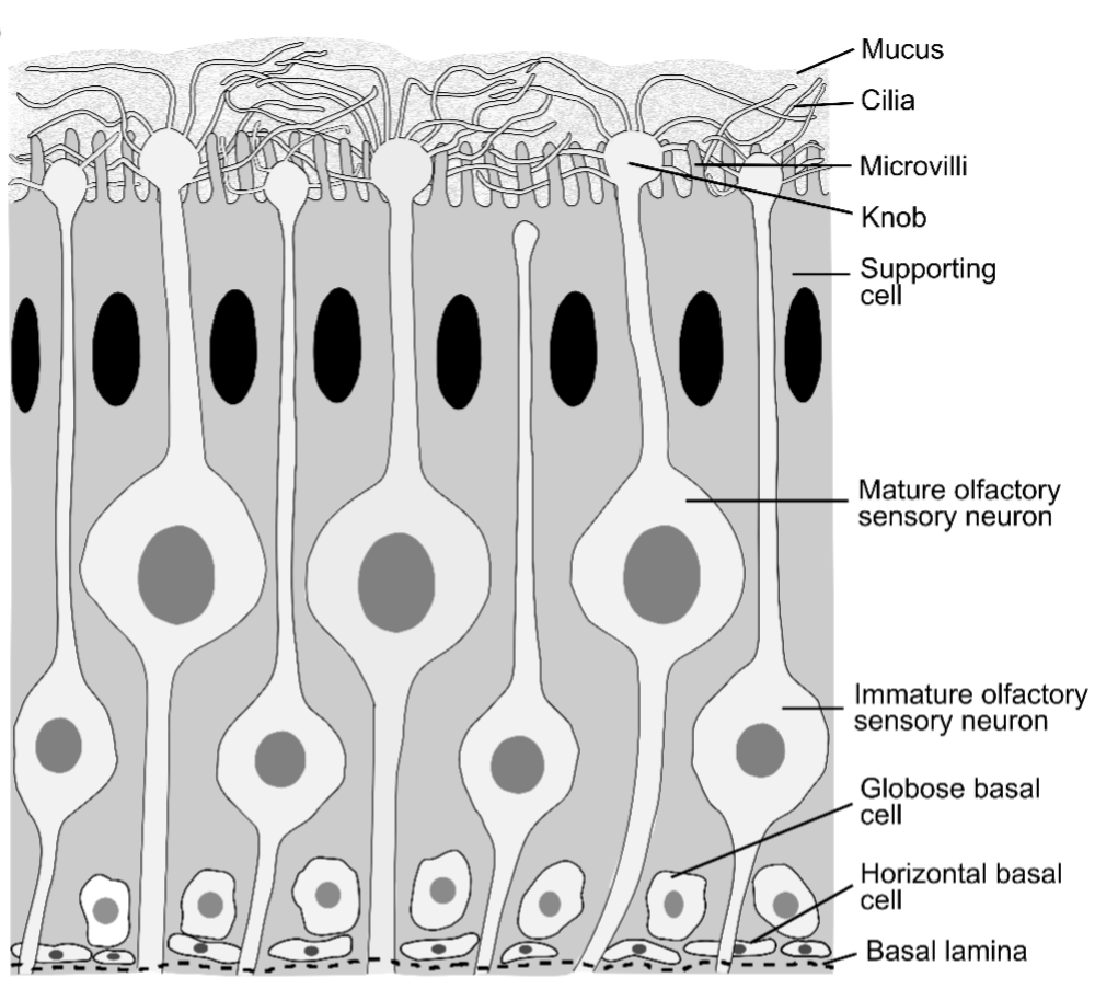 Fig. 1. Representaciones esquemáticas e imágenes confocales de secciones coronales de la nariz. El epitelio olfativo pseudoestratificado se compone principalmente de células de soporte, neuronas sensoriales olfativas y células basales. Las células de soporte tienen cuerpos celulares columnares, microvellosidades en el lado apical y residen en la región más apical del epitelio. Las neuronas sensoriales olfativas maduras e inmaduras son neuronas bipolares con un solo proceso dendrítico que se proyecta hacia la superficie apical del epitelio. En las neuronas sensoriales olfativas maduras, varios cilios sobresalen de la perilla dendrítica. Dos tipos de células basales residen cerca de la lámina basal: las células basales horizontales (HBC) que están unidas a la lámina basal y las células basales globosas (GBC) que se encuentran por encima de la capa de HBC.